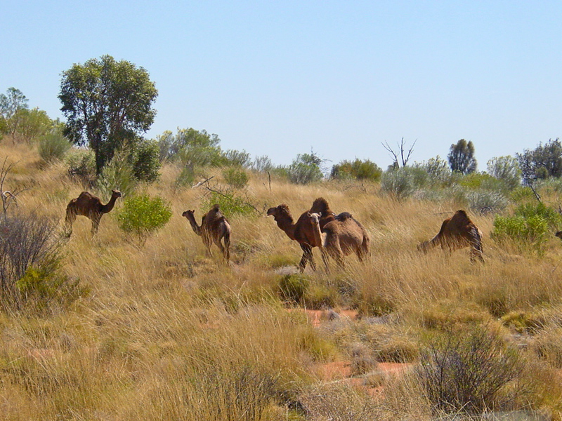 Camel Farm